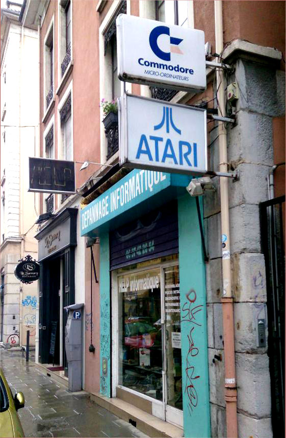 Un revendeur spécialisé en informatique. La devanture témoigne du duel Atari contre Commodore. 7 RUE DE STRASBOURG - 38000 GRENOBLE ISERE FRANCE - 2013